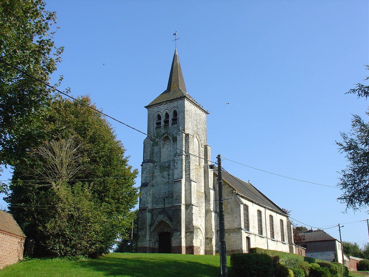 Église de Lattre-Saint-Quentin